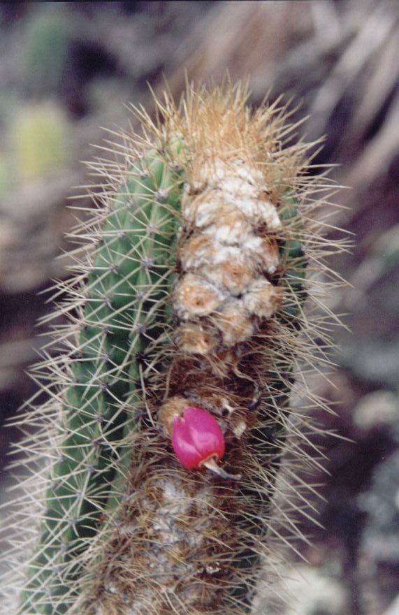 Foto tirada no Morro do Moreno